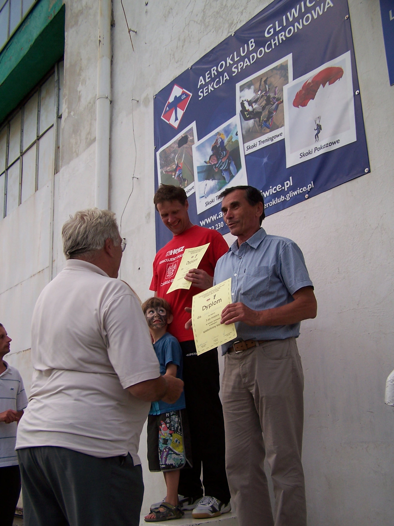 Spadochronowe Mistrzostwa Śląska 2013. Klasyfikacja indywidualna (celność lądowania — spadochrony klasyczne): I miejsce — Robert Krawczak, III miejsce - Jan Isielenis (1,36 m) — Sekcja Spadochronowa Aeroklubu Gliwickiego. Dyplomy wręcza Kazimierz Stępniewski — Prezes VII Oddziału Katowice Związku Polskich Spadochroniarzy